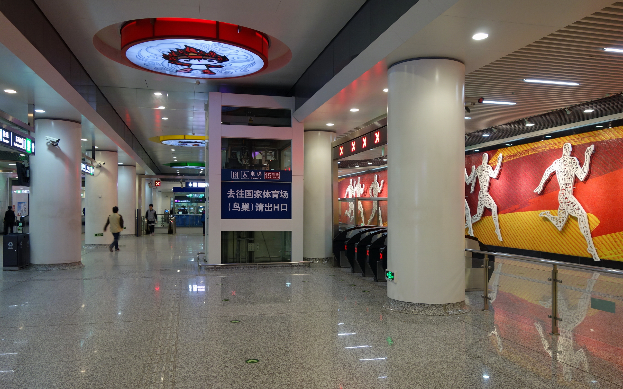 北京地铁15号线奥林匹克公园站站厅